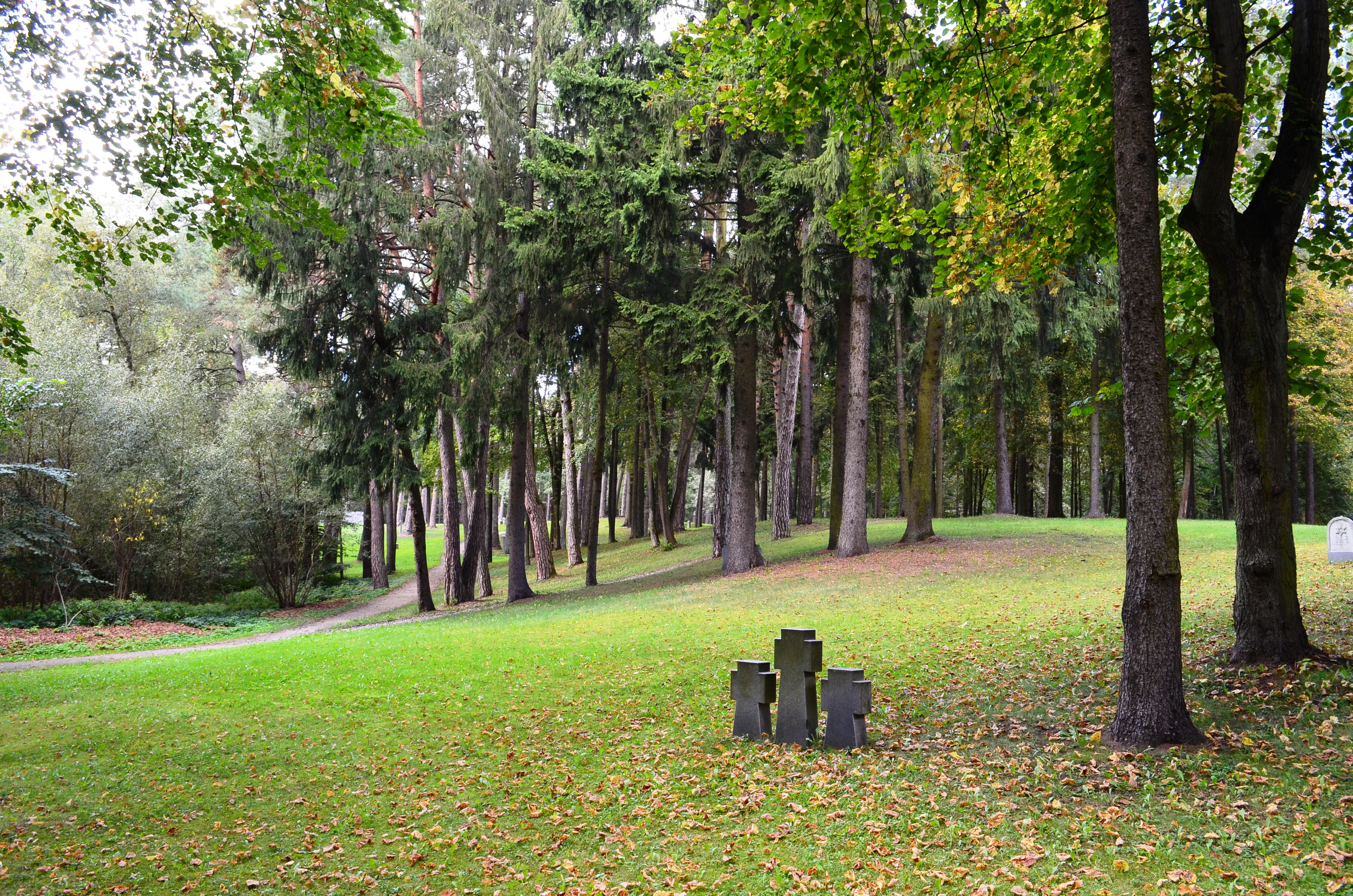 Vingio parkas, kapinaitės netoli įėjimo nuo Čiurlionio g., Vilnius